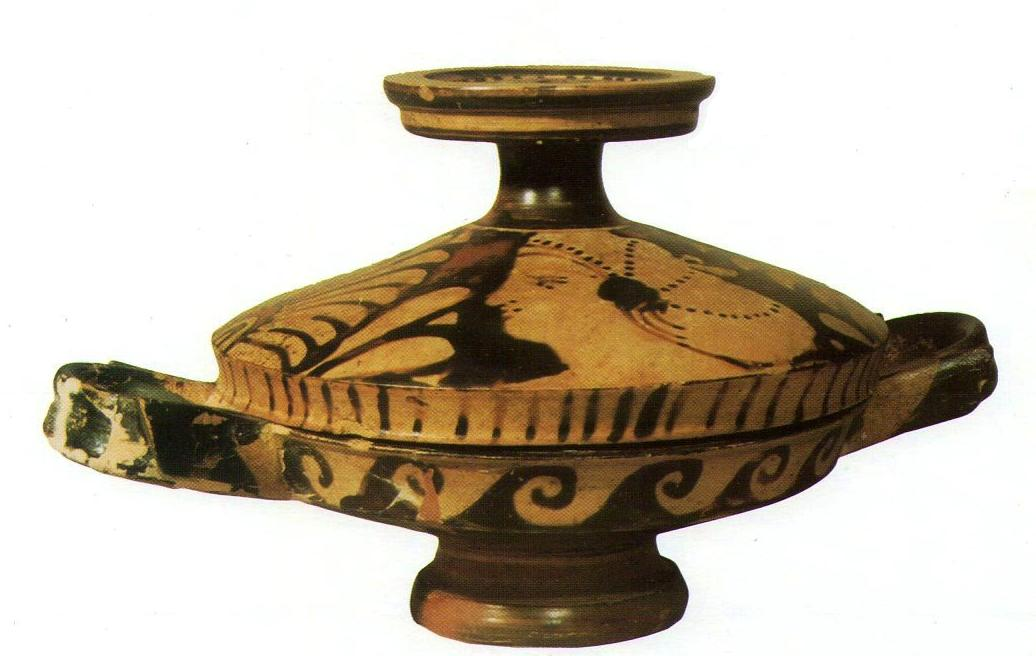 Lekane a figure rosse proveniente dalla necropoli di Madonna delle Grazie (Gragnano)